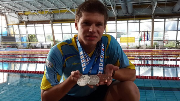 МСМК з плавання. Дефлімпійські ігри